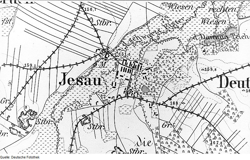 Original image description from the Deutsche Fotothek Kamenz-Jesau. Meßtischblatt, Sekt. Kamenz, 1883